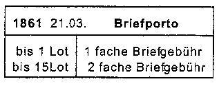 Das letzte preußische Briefporto